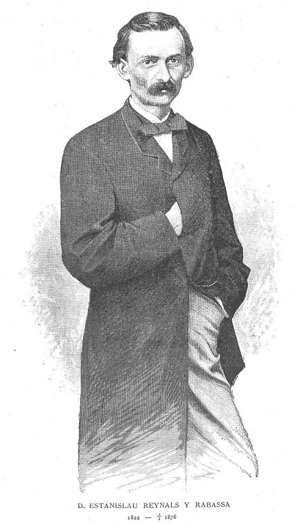 Retrato de Estanislao Reynals y Rabassa, en la revista La Ilustració Catalana.